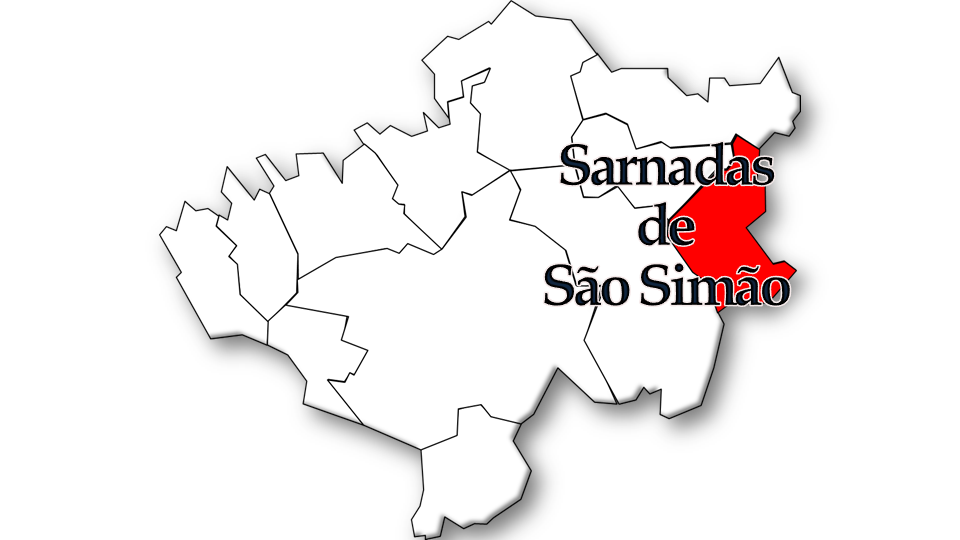 População